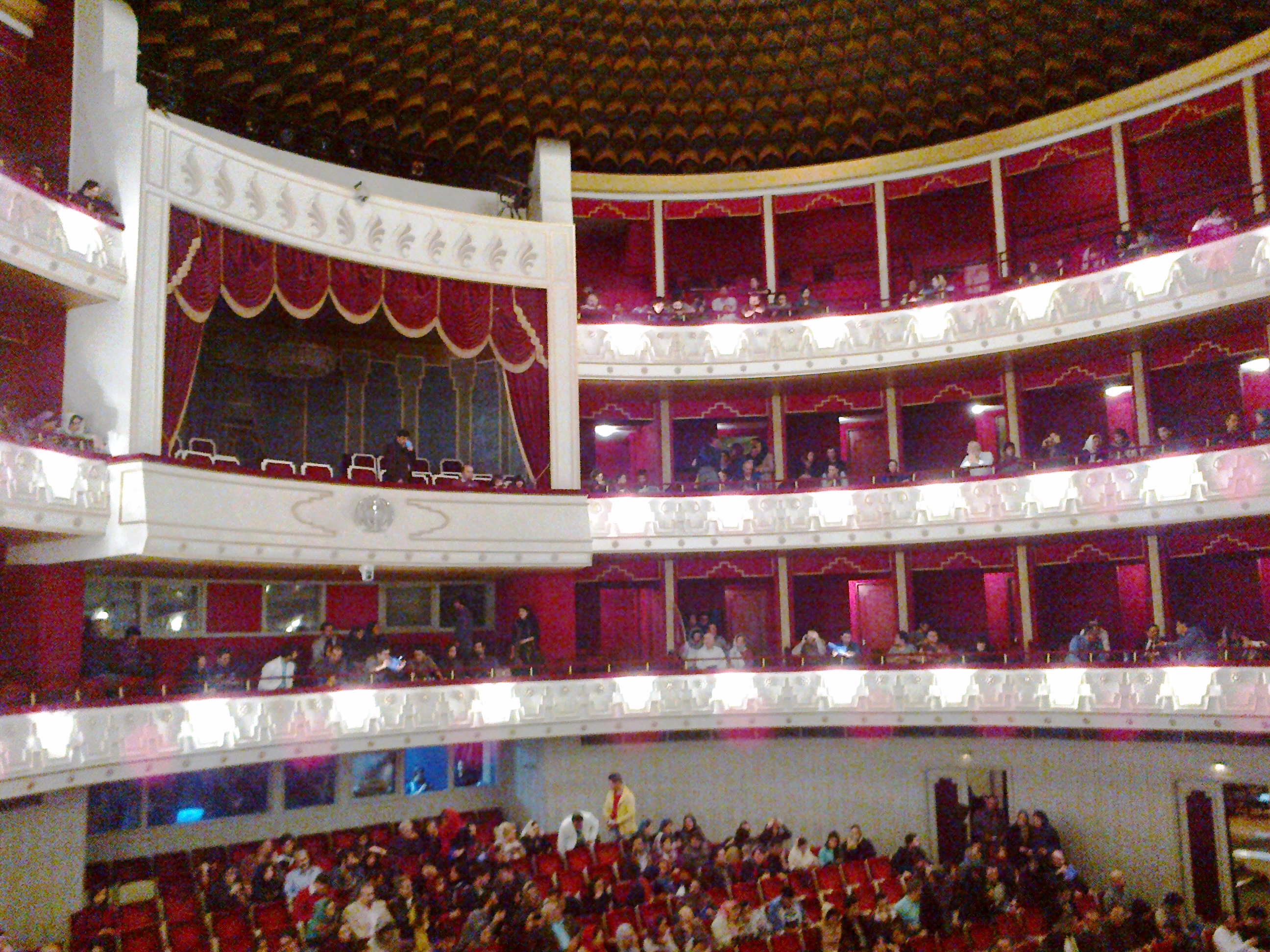 درون تالار وحدت، بالکن‌های شرقی و جایگاه ویژه